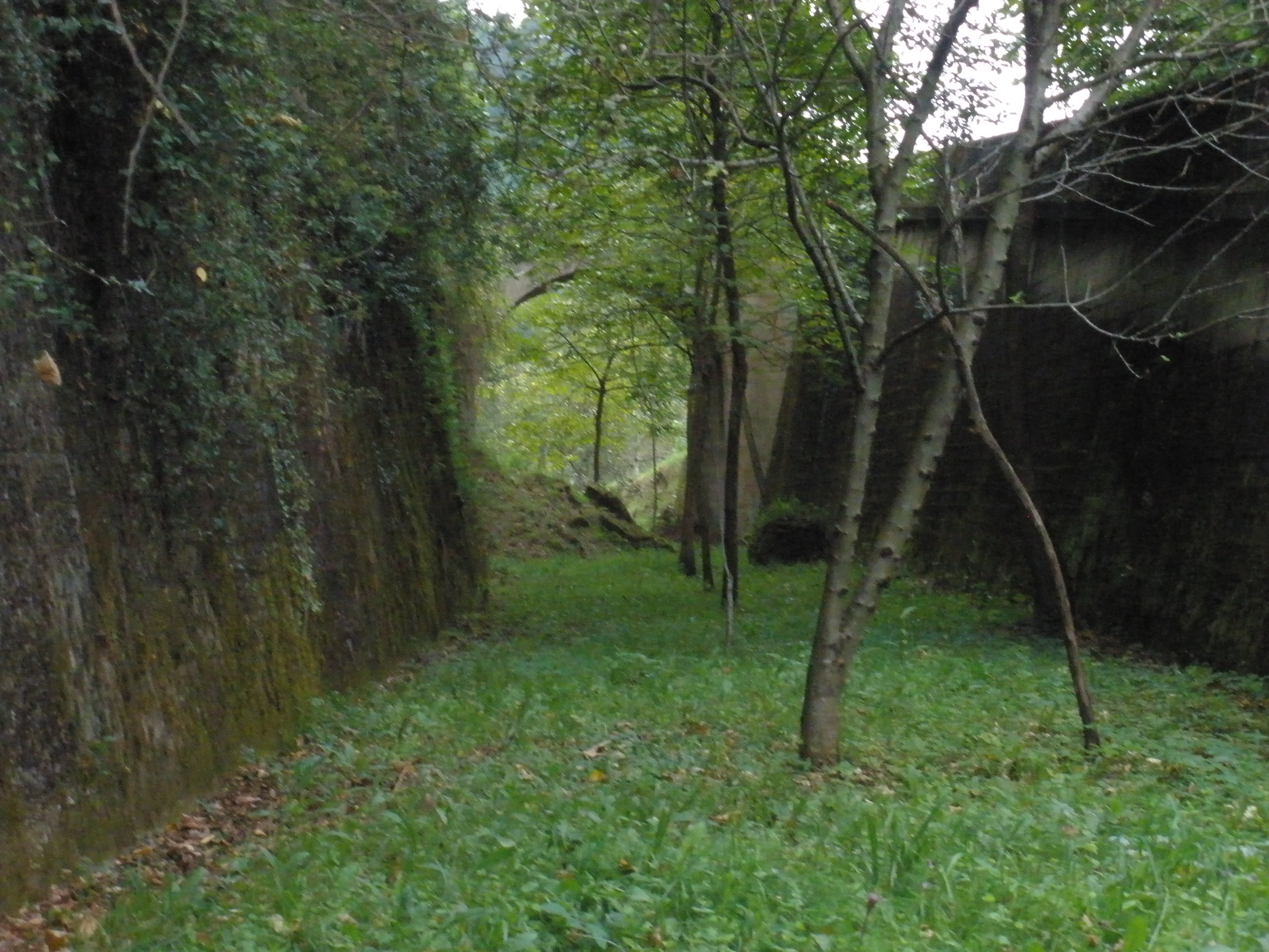 Parte del trazado en trinchea del malogrado ferrocarril de Pravia a Villablino, entre Cornellana y Laneo.